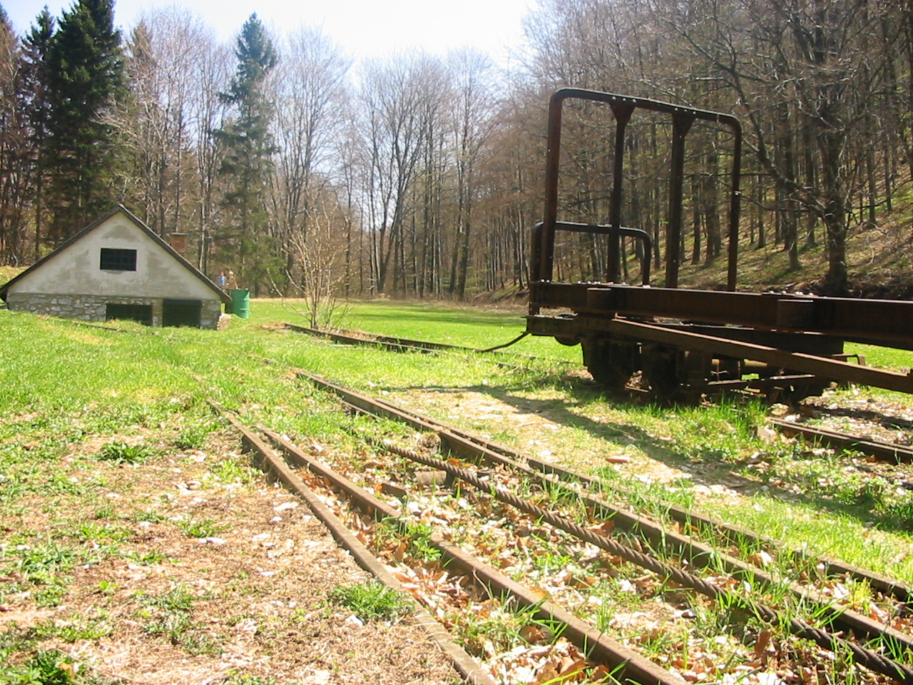 A Szilvásváradi Erdei Vasút siklópályájának felső üzemének ipari műemlék maradványai